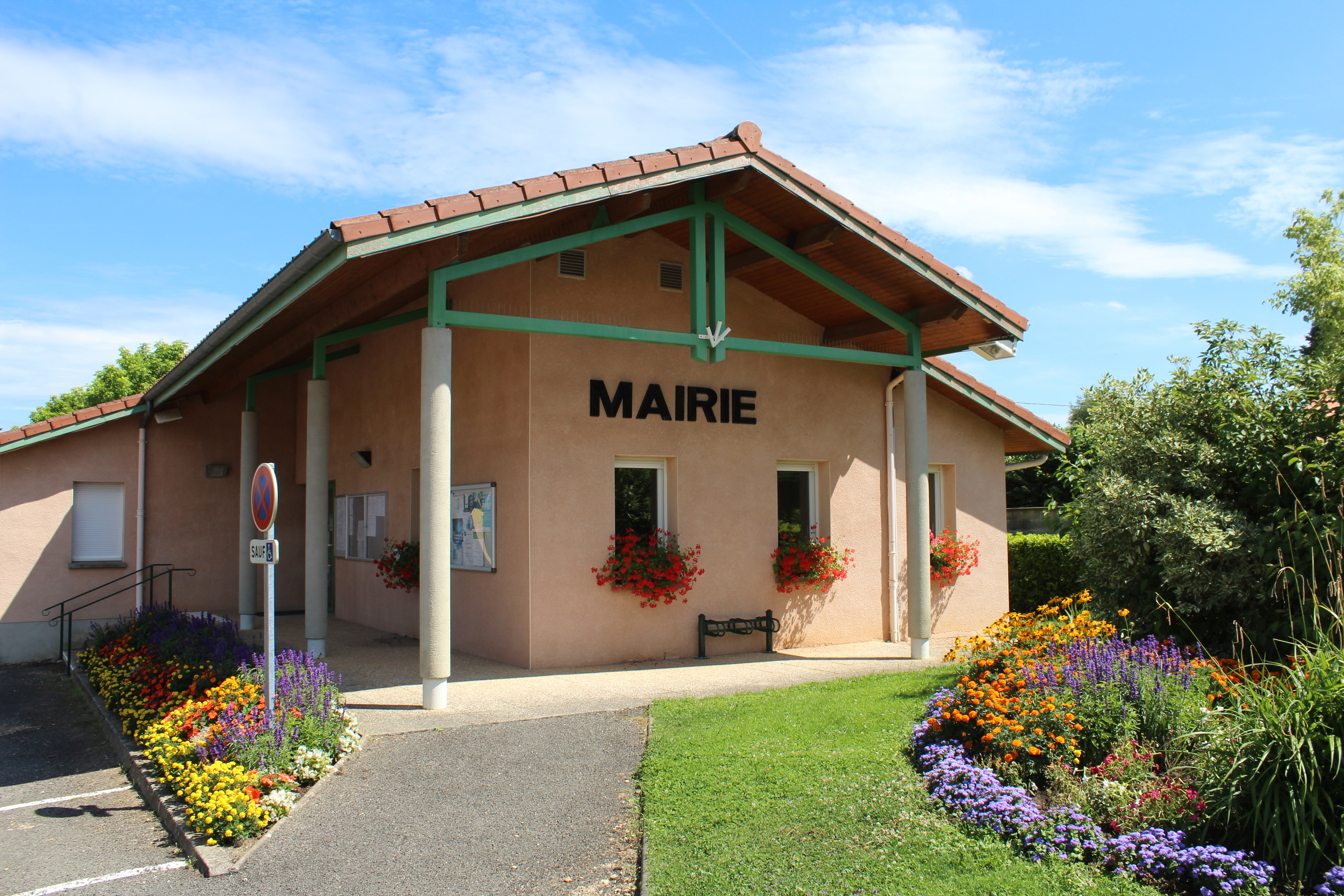 Mairie de la commune de Cruzilles-lès-Mépillat.